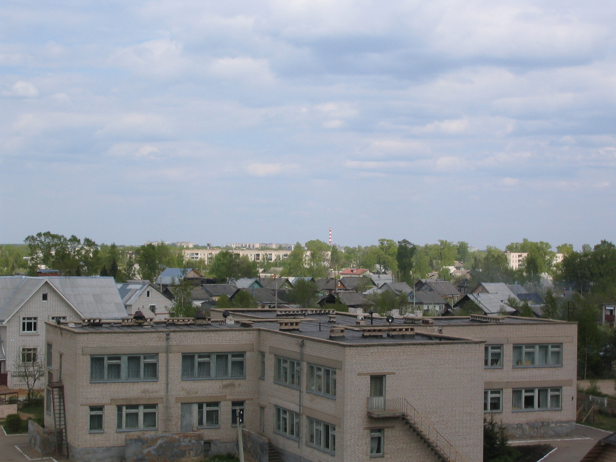 Детский сад №6 в г. Ржев Тверской обл.